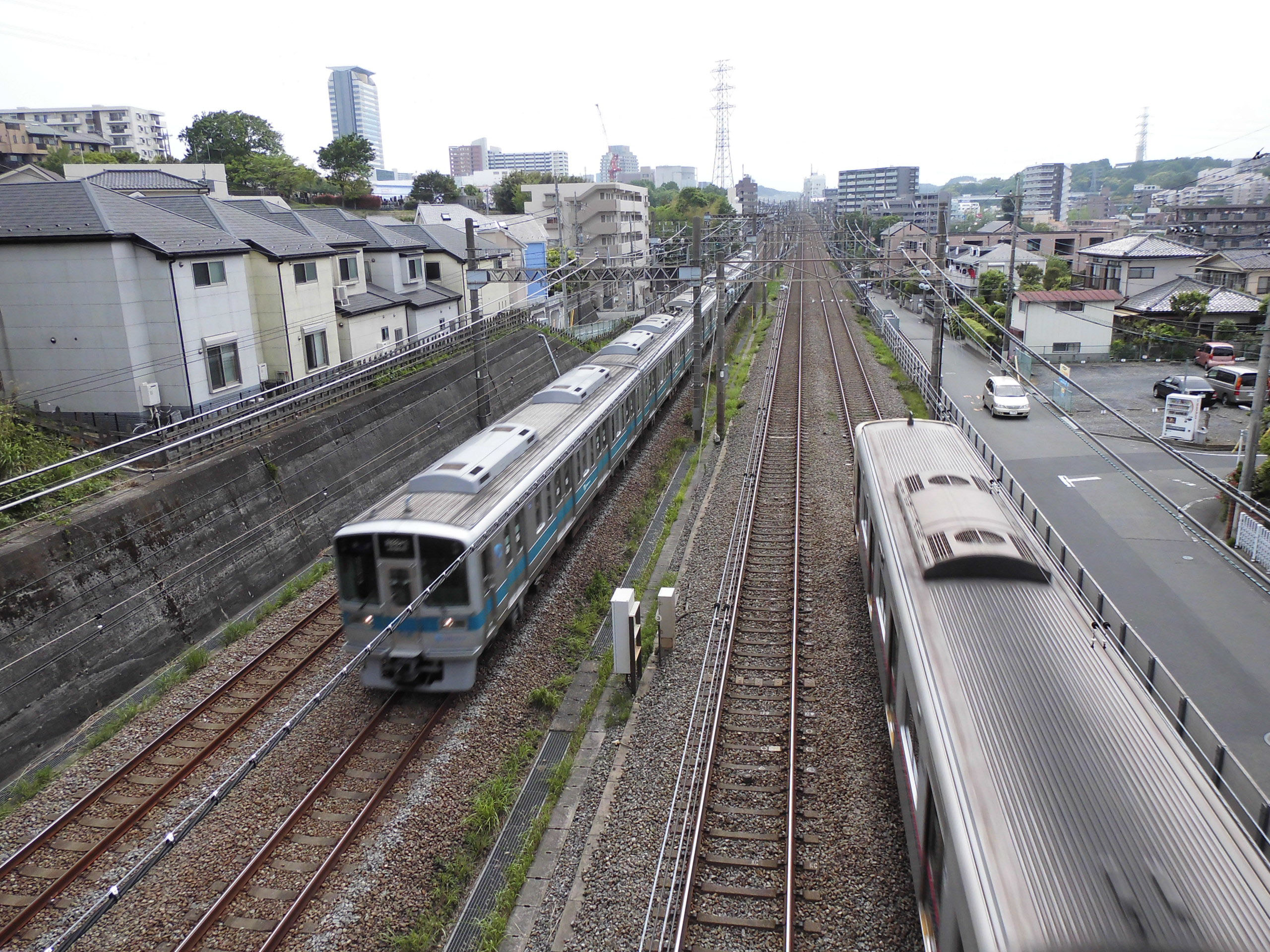 多摩市内で並走する京王線と小田急線140514